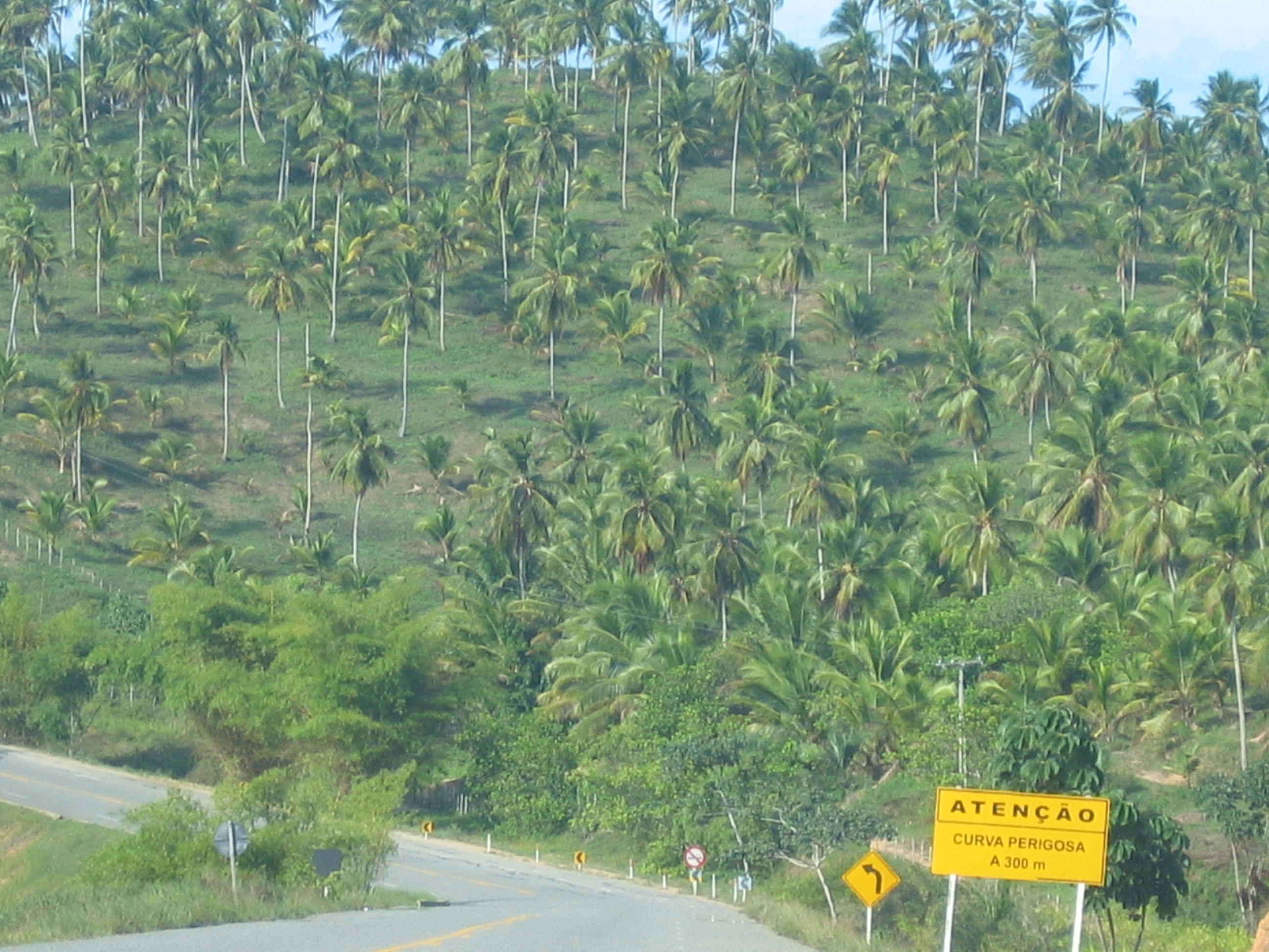 Linha Verde, Bahia, Brasil.